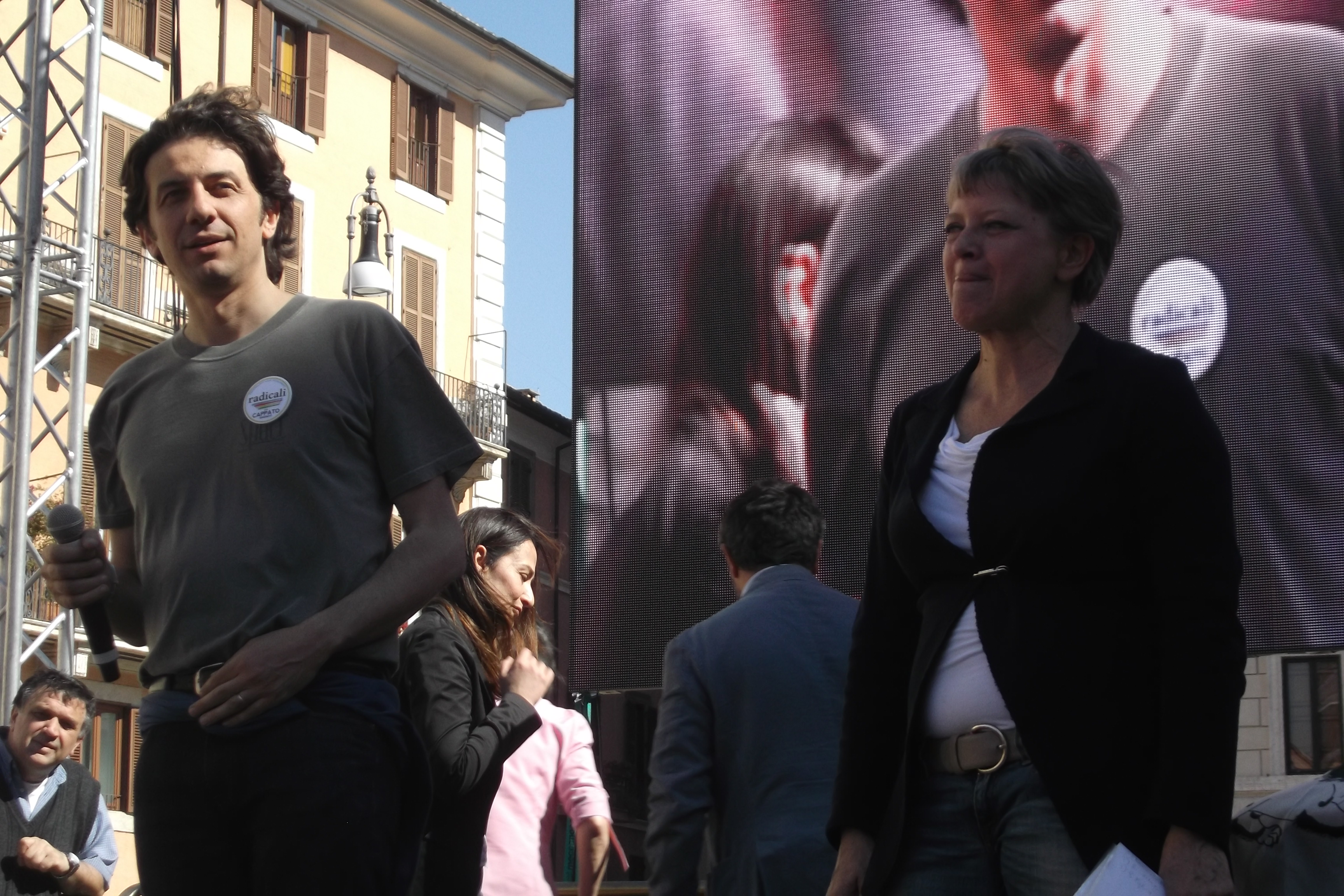 Former Radical Party secretary Marco Cappato during the civil funeral of the Italian activist and politician Marco Pannella, Rome, Piazza Navona